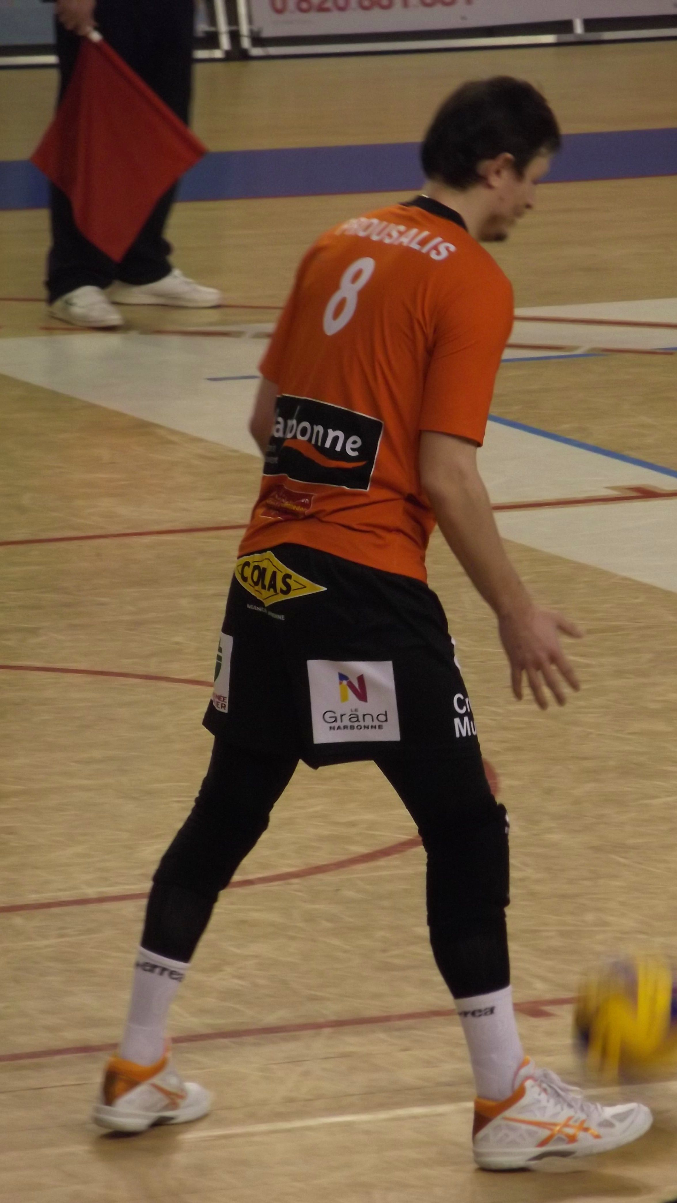 Konstantínos Proúsalis (Narbonne Volley), février 2016.